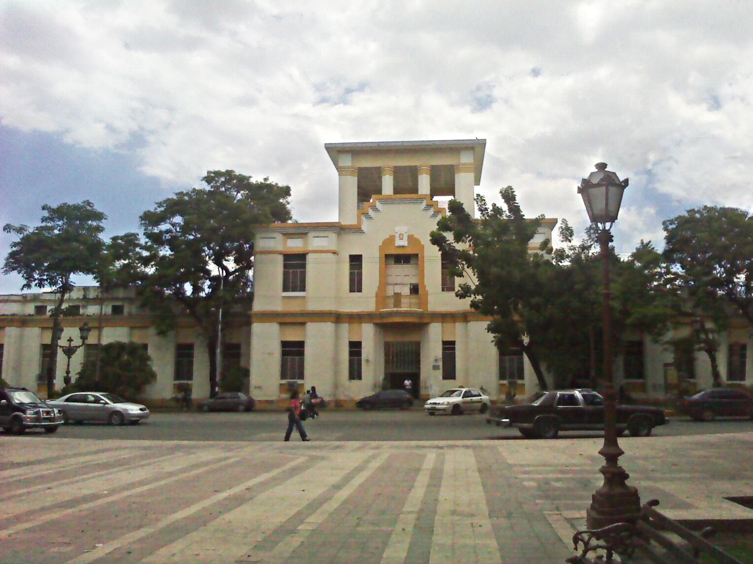 Fachada Principal del Hospital Civil